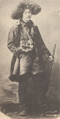 Gustav Radde, Geograph und Naturforscher, Sibirien, 1857 Fotograf: Unbekannt